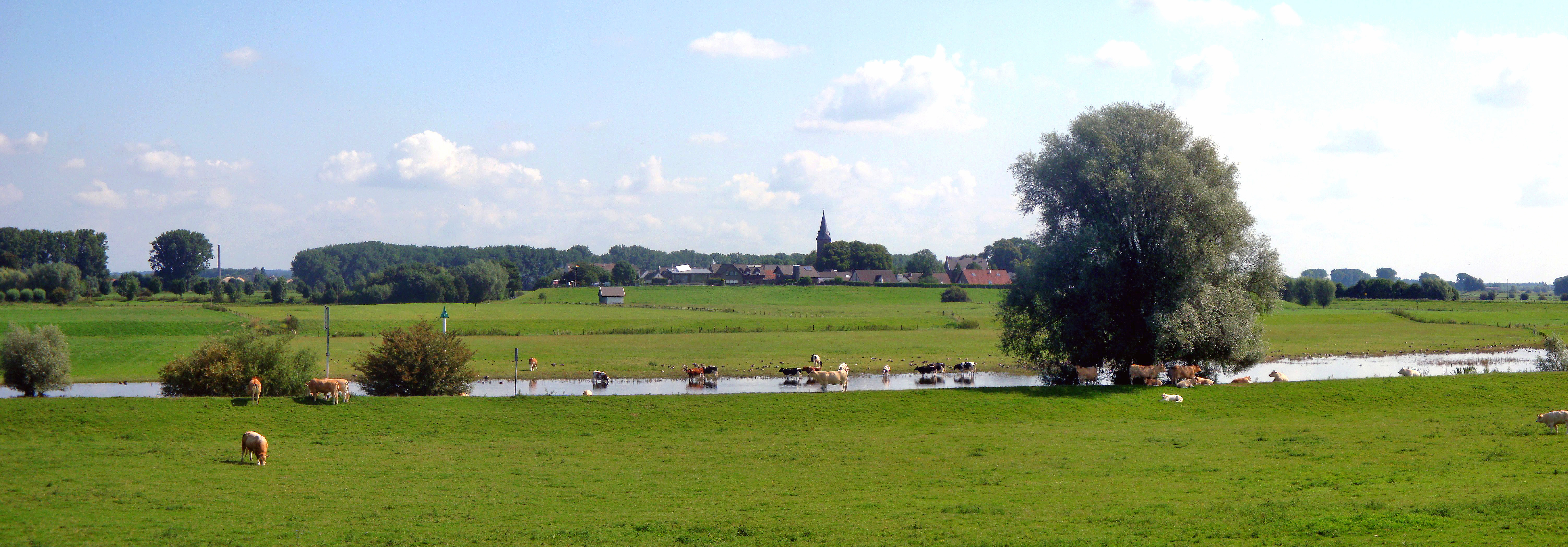 Schenkenschanz und Griethauser Altrhein (August 2014)